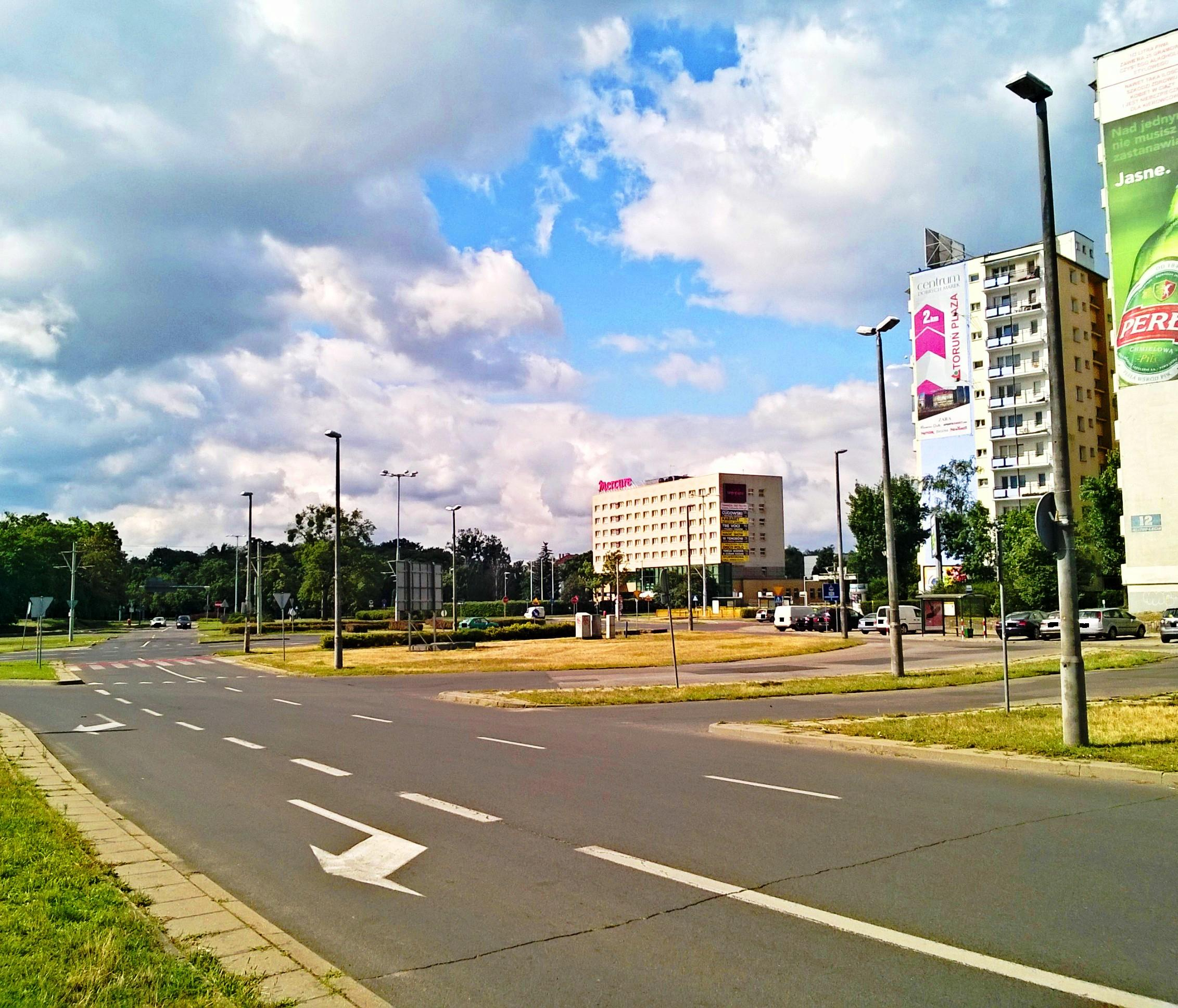 Plac Niepodległości w Toruniu